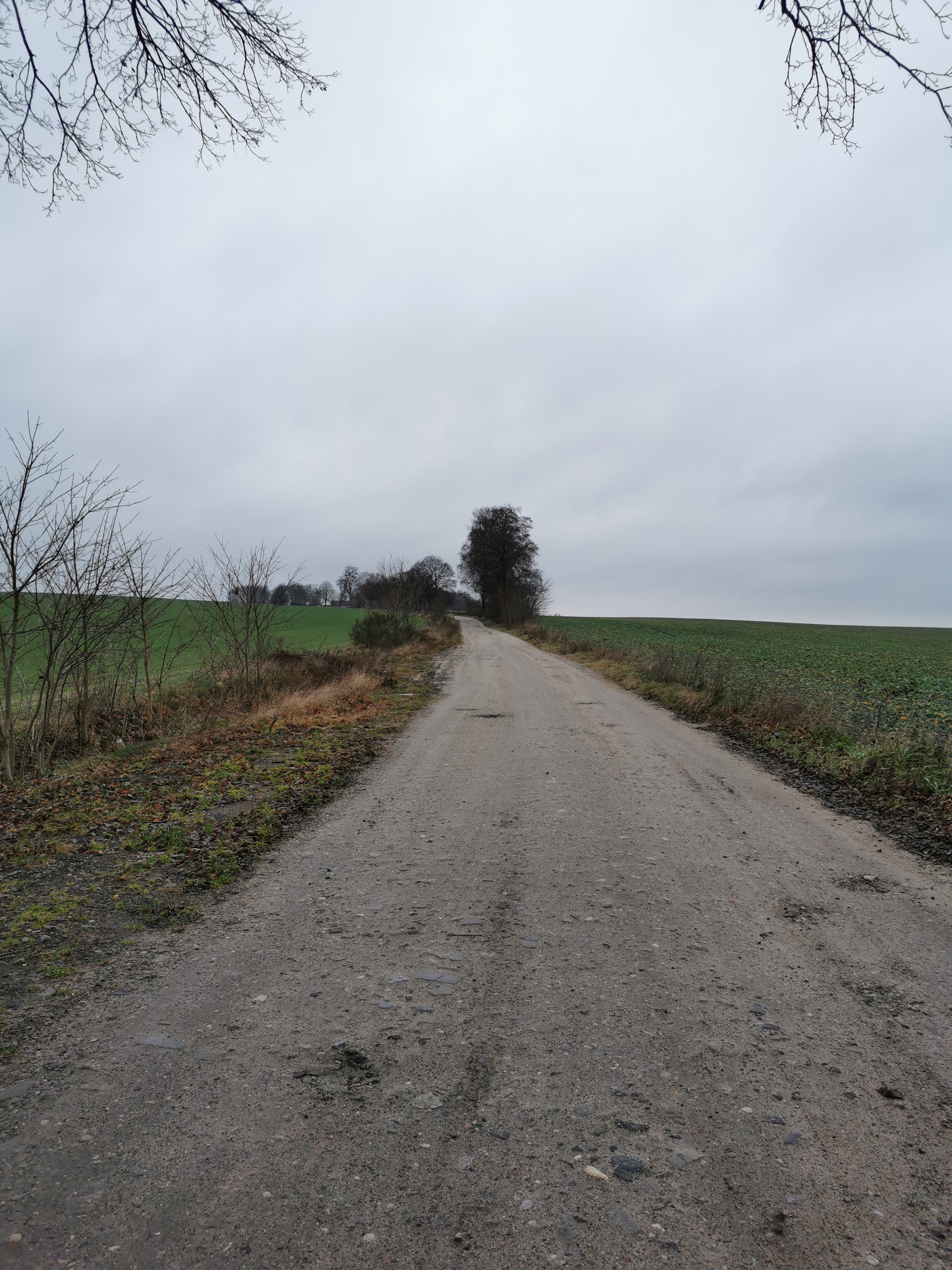 Droga prowadząca do Troszek w gminie Dębnica Kaszubska